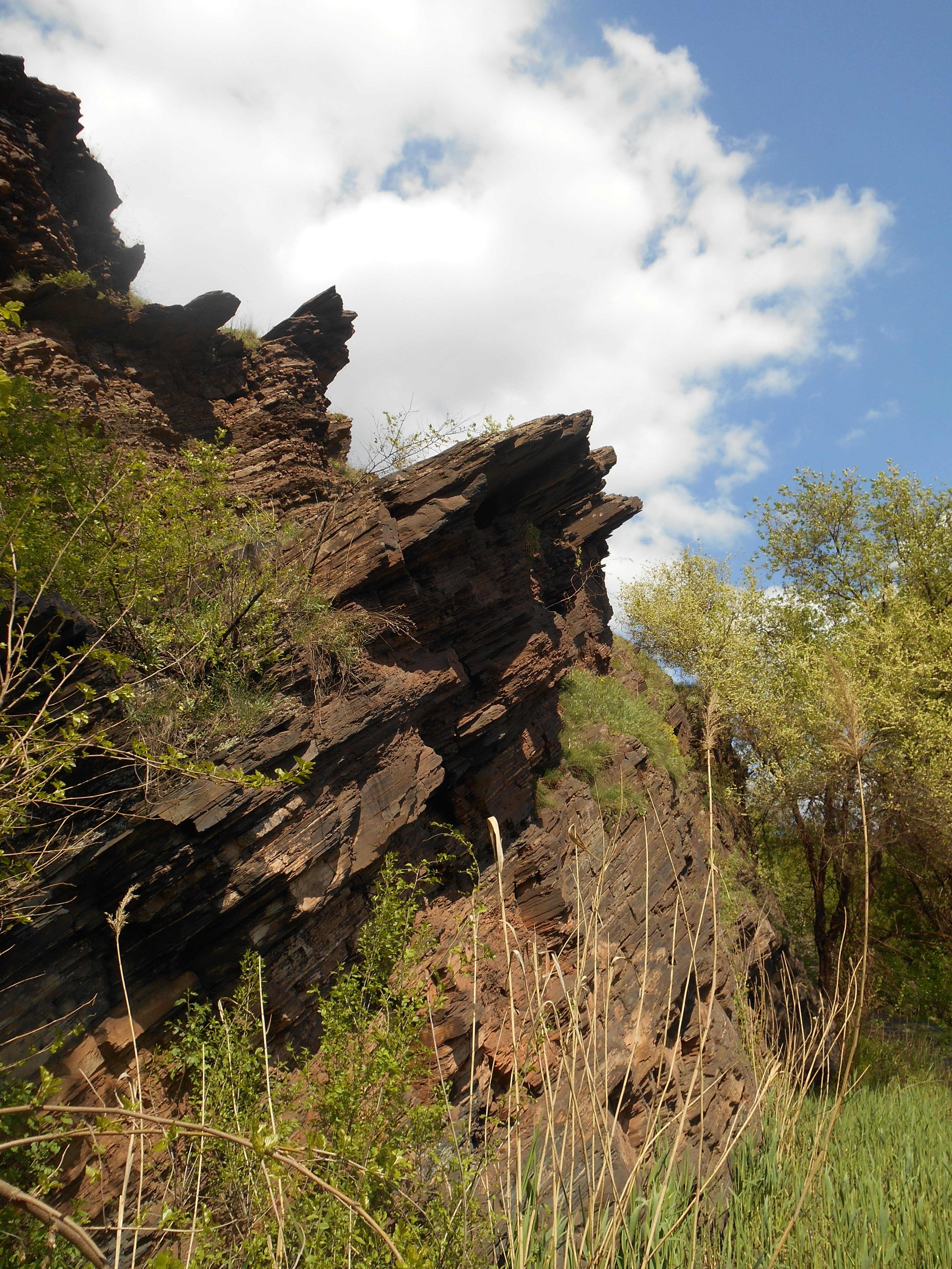 Сланцеві скелі, м. Кривий Ріг, біля шахт «Південна» та «Північна», правий берег р. Саксагань